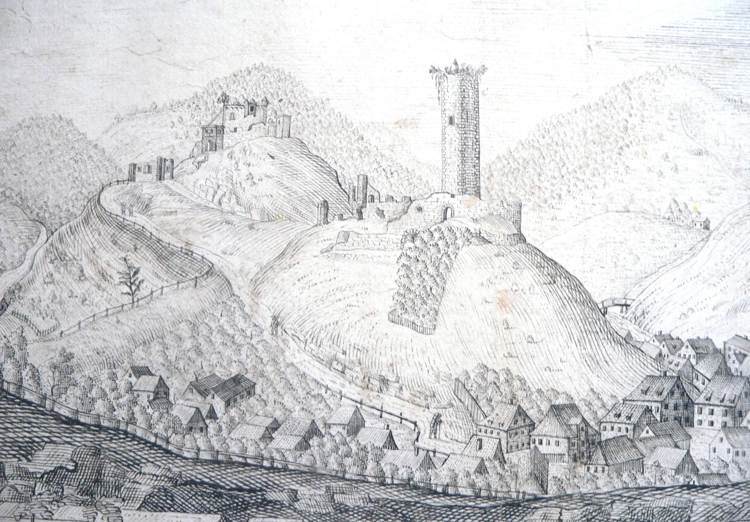 Ansicht von Bad Berneck aus dem Jahr 1767 (Ausschnitt)